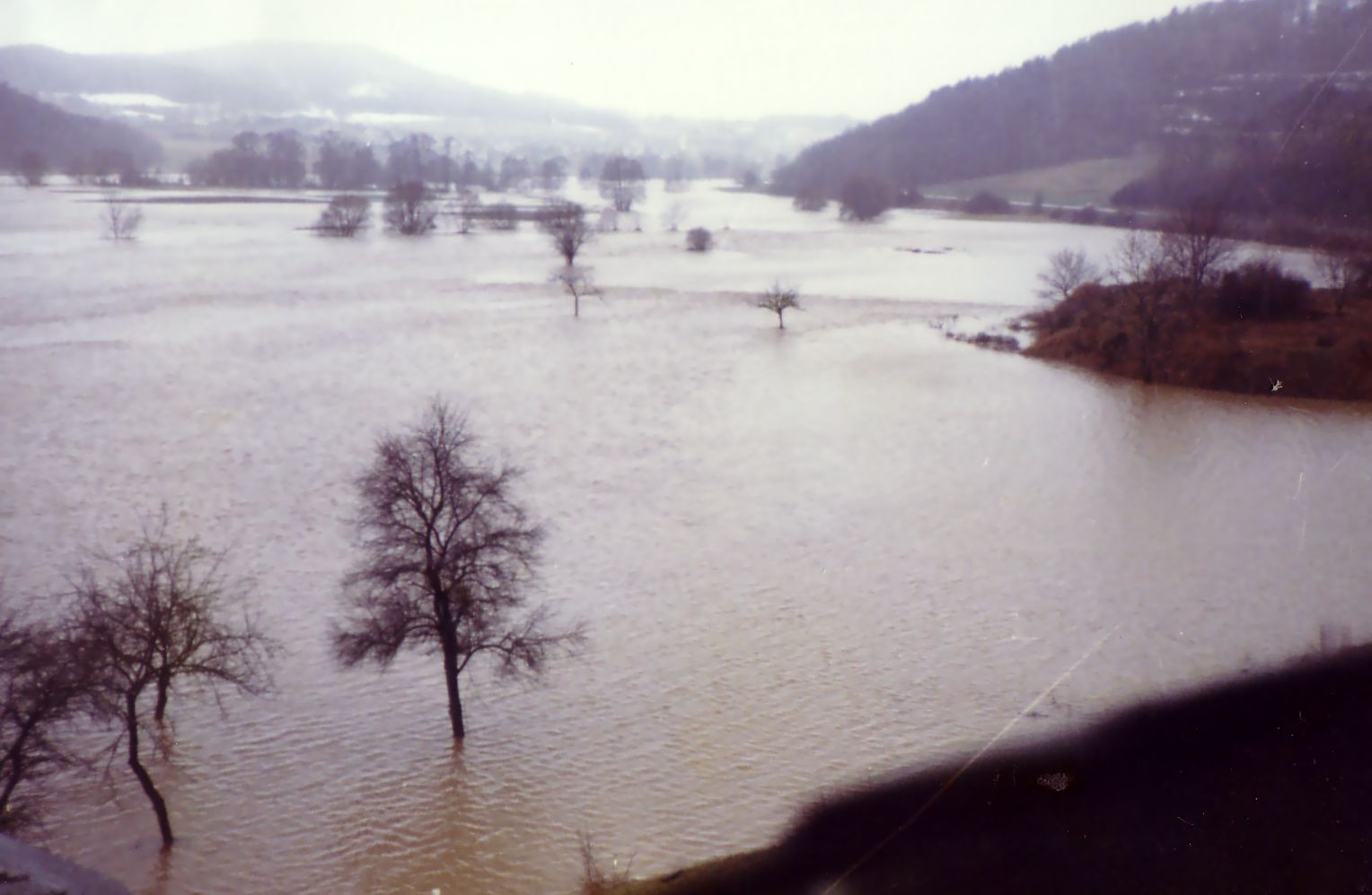 Das Jahrhunderthochwasser 1984 - Lahn zwischen Friedensdorf (Hintergrund) und Buchenau